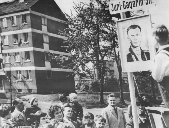 Karl-Marx-Stadt, Namensgebung Juri-Gagarin-Straße Zentralbild Gahlbeck 8.5.1961 Karl-Marx-Stadt ehrte Juri Gagarin. Den Namen des ersten Kosmonauten der Welt, Juri Gagarin, trägt seit dem 16. Jahrestag der Befreiung die Zschopauer Straße in Karl-Marx-Stadt. Zur feierlichen Umbenennung hatten sich viele Einwohner und Junge Pioniere eingefunden. UBz: Der junge Pionier Frank Sablonski, der am Jahrestag der Befreiung seinen 9. Geburtstag feierte, enthüllte das neue Straßenschild, das mit einem von dem Karl-Marx-Städter Künstler Will Schestak gestalteten Porträt von Juri Gagarin geschmückt ist.